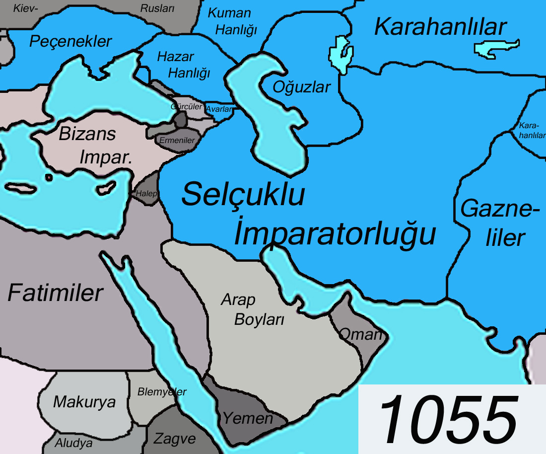 Kaynak: Jean-Paul Roux'un Türklerin Tarihi (İSBN 975-997-091-0) adlı kitabındaki tariflerine göre kendim ürettim. Kategori:Türk tarihi